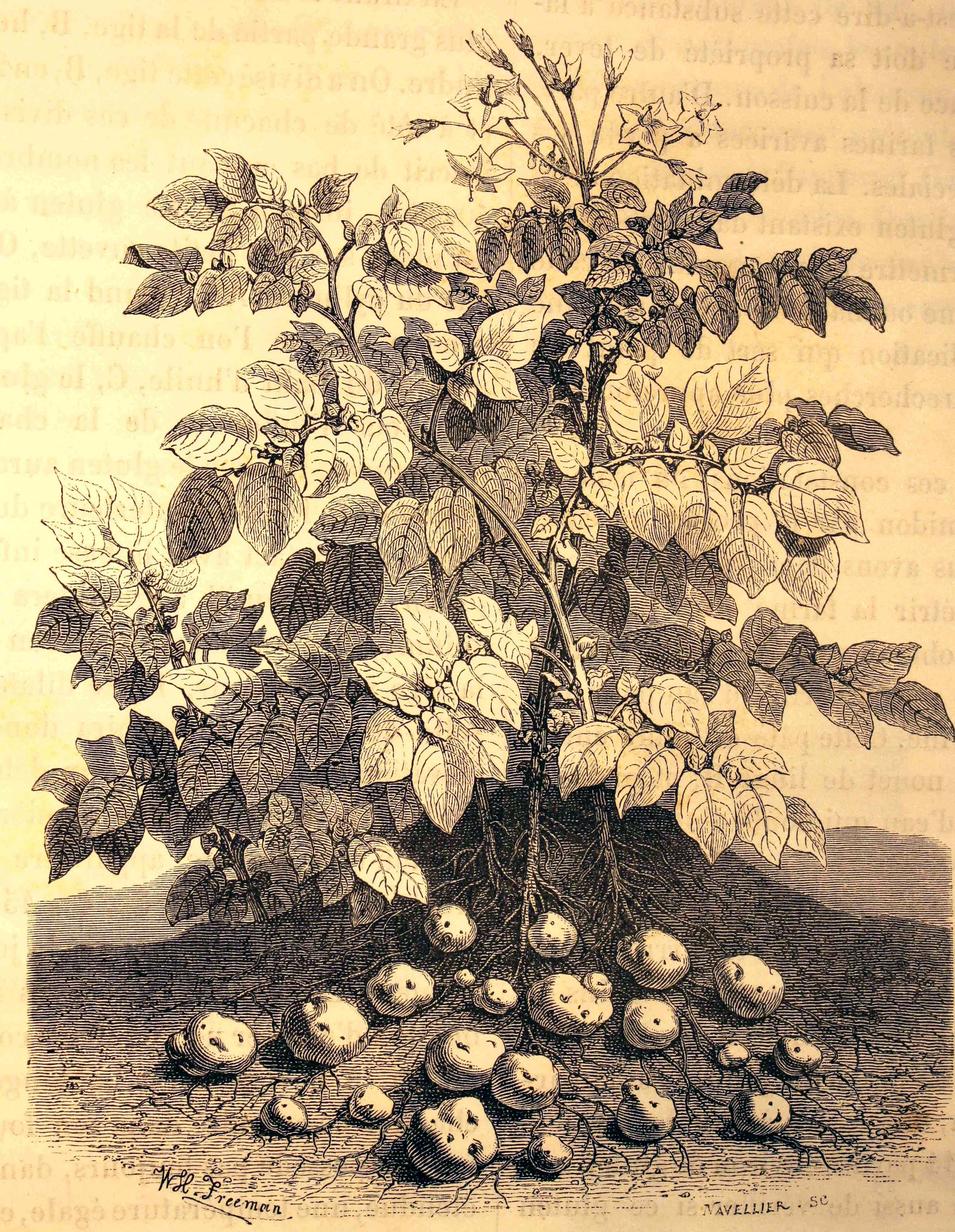 Illustration d'un plant de pommes de terre extraite de l'ouvrage Les merveilles de l'industrie ou Description des principales industries modernes par Louis Figuier, Pari, Furne, Jouvet, [1873-1877]